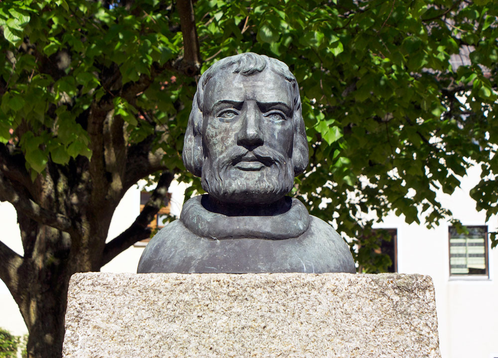 Pfalzgraf Ulrich II. von Leuchtenberg auf einem Denkmal hinter der Pfarrkirche in Pfreimd